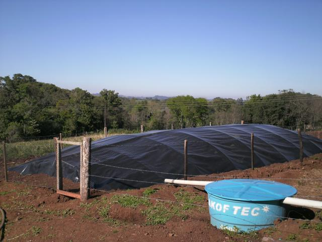 Cisterna de Lona para captação de água da Chuva instalada no interior do Município de Cunha Porã SC